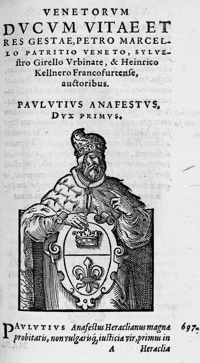 Paulucius Anafestus (Paolo Lucio Anafesto), erster Doge von Venedig, aus: Pietro Marcello, Silvester Girellus und Heinrich Kellner: De vita, moribus, et rebus gestis omnium ducum Venetorum, (Frankfurt, Paul Reffeler für Sigismund Feyerabend), 1574.